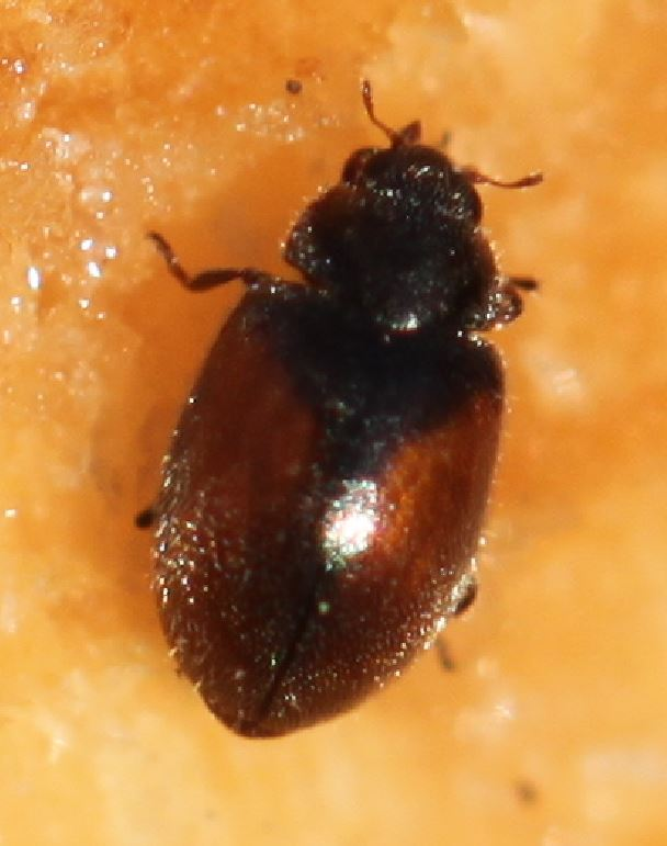 Gestreifter Kiefern-Zwergmarienkäfer (Scymnus suturalis) an der Schnittfläche eines gefällten Kiefernbaumstamms in der Schwetzinger Hardt am 25. Februar 2019